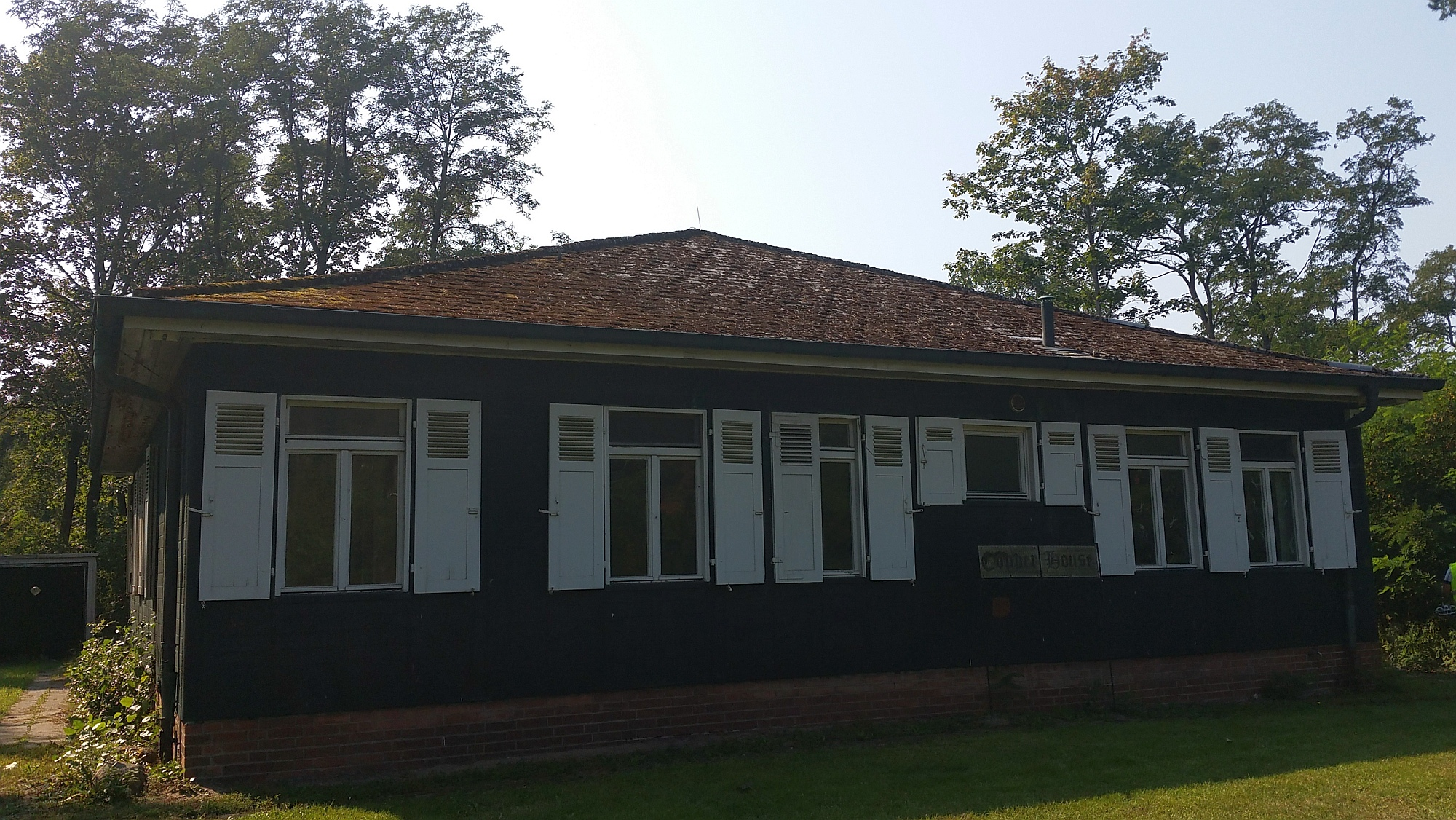 Kupferhaus in Berlin Spandau, Flugplatz Gatow, Außenhaut mit Kupferblechen verkleidet. Wurde beim Bau des Flugplatzes von einer nahegelegenen und abgerissenen Siedlung versetzt. Nach dem Krieg verschiedene Nutzungen durch die Royal Airforce (zuletzt Frisör). Bundeswehr plant Restaurierung und Sitz für Militärkaplan.This is a photograph of an architectural monument.